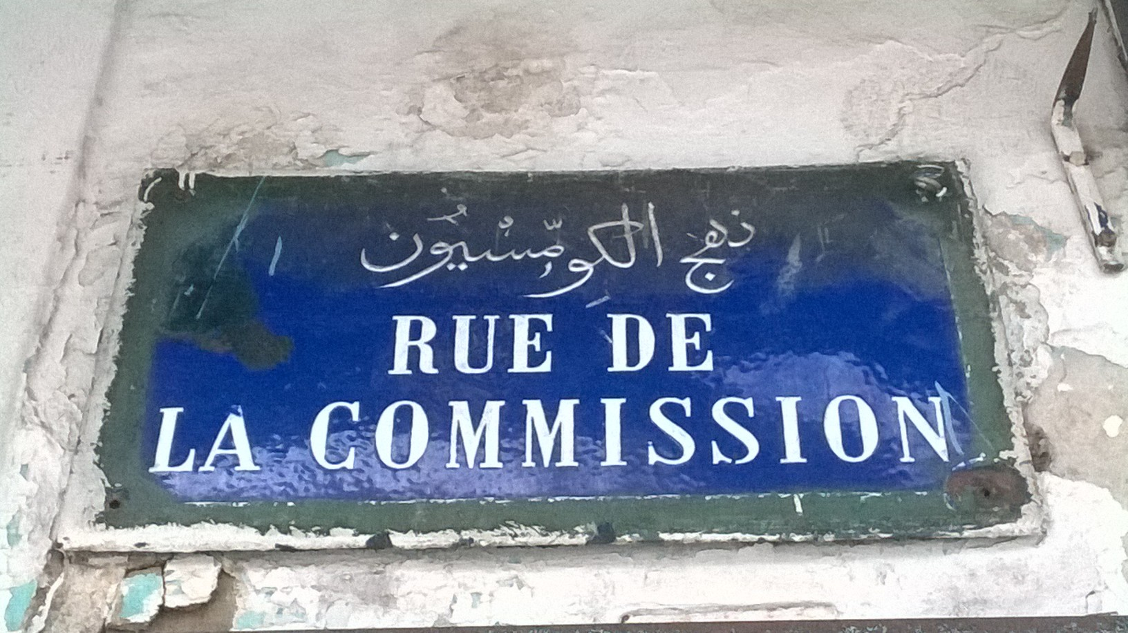 La médina de Tunis مدينة تونس العتيقة